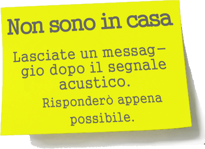 post-it